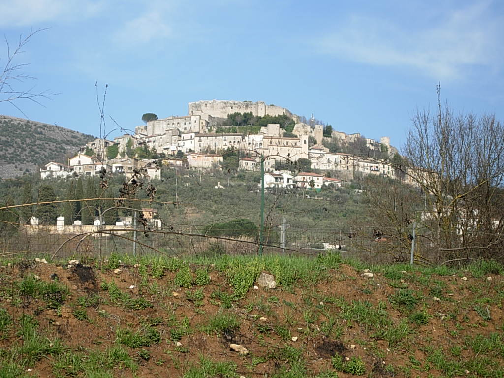 Panorama di Vicalvi (FR), foto personale concessa in pubblico dominio